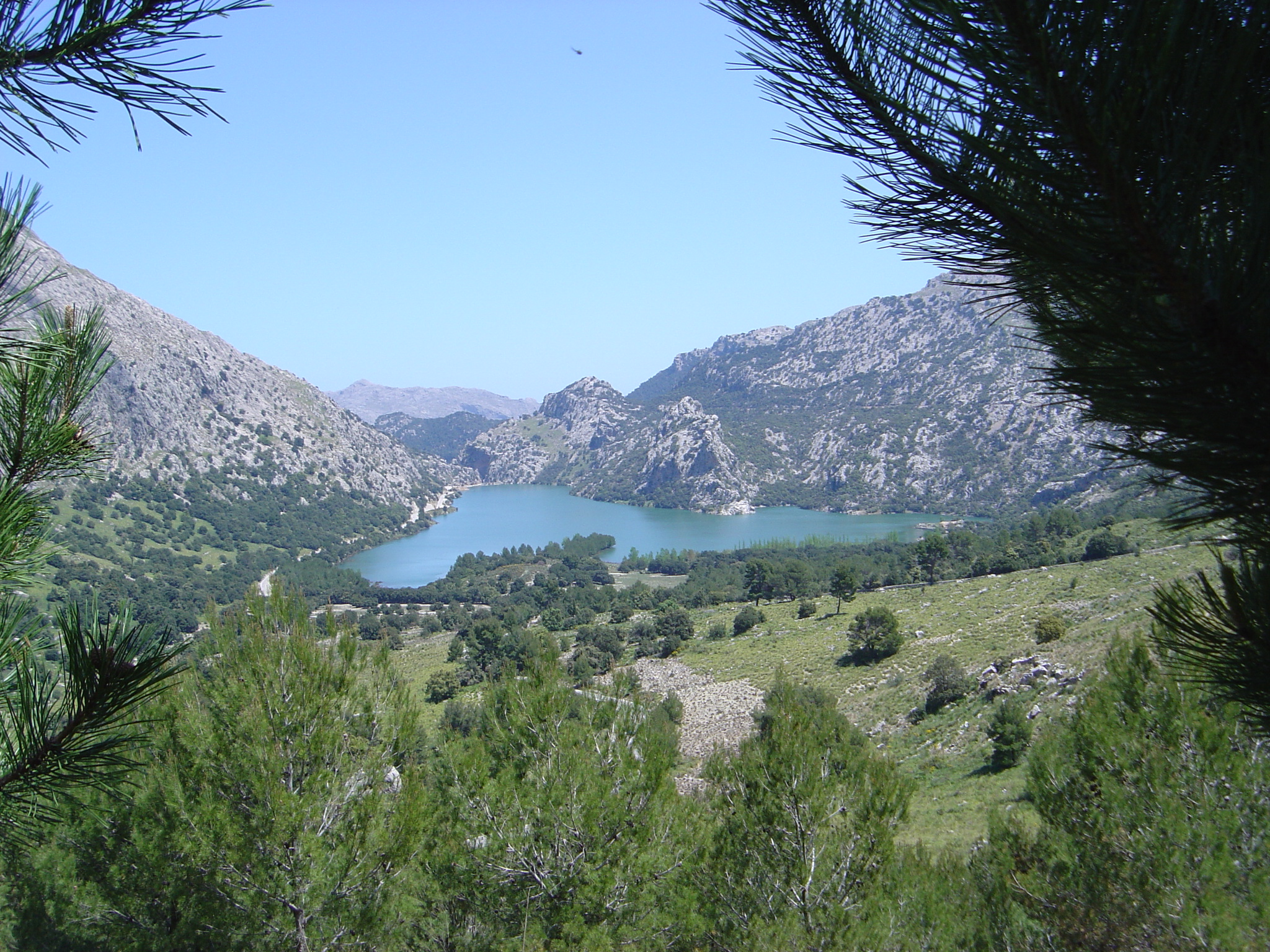 Gorg Blau. Mallorca (España).